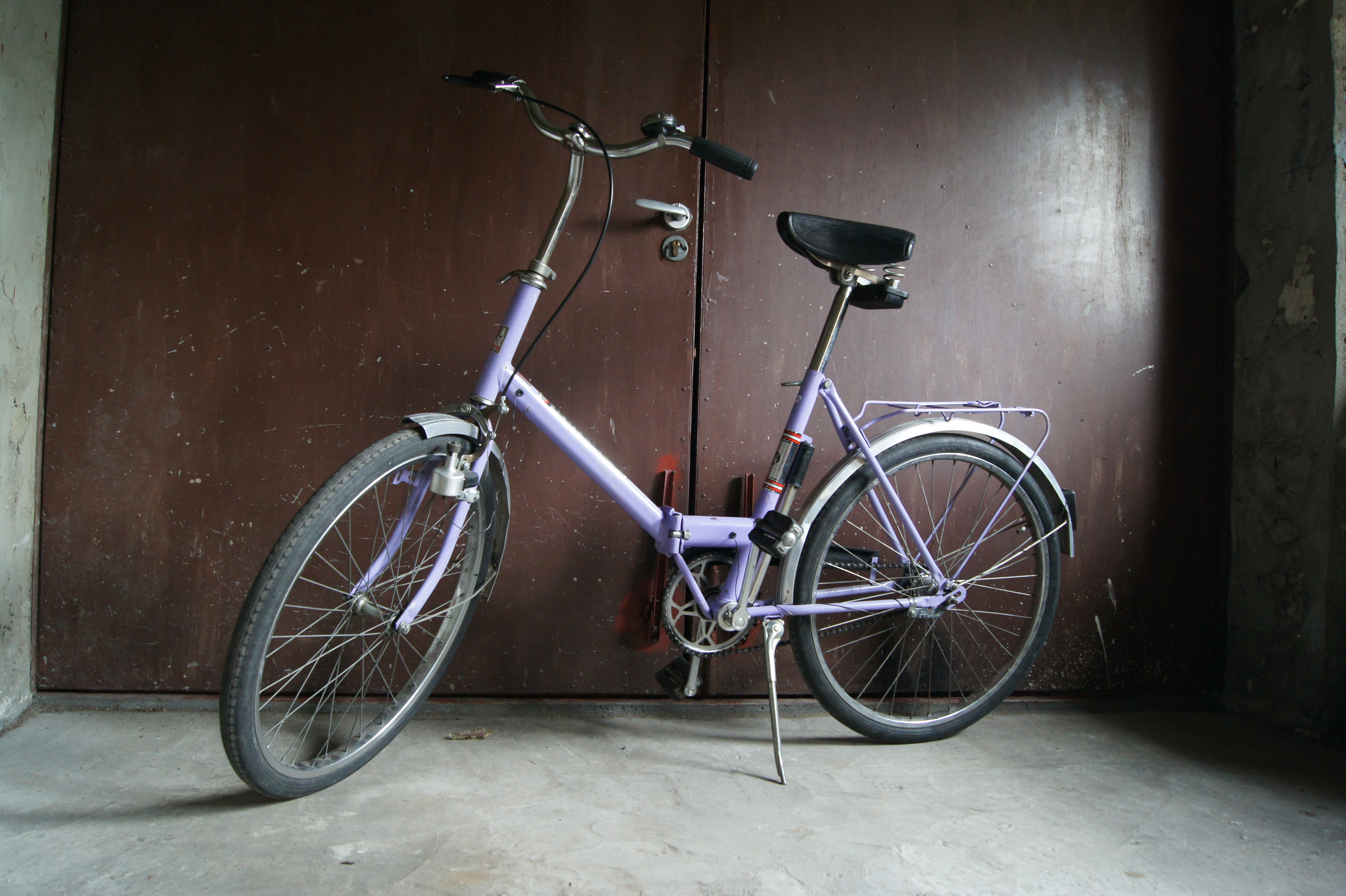 Rower Romet Jubilat 2 z 1989 roku. Brak przedniej lampy oraz klosza tylnej lampy.